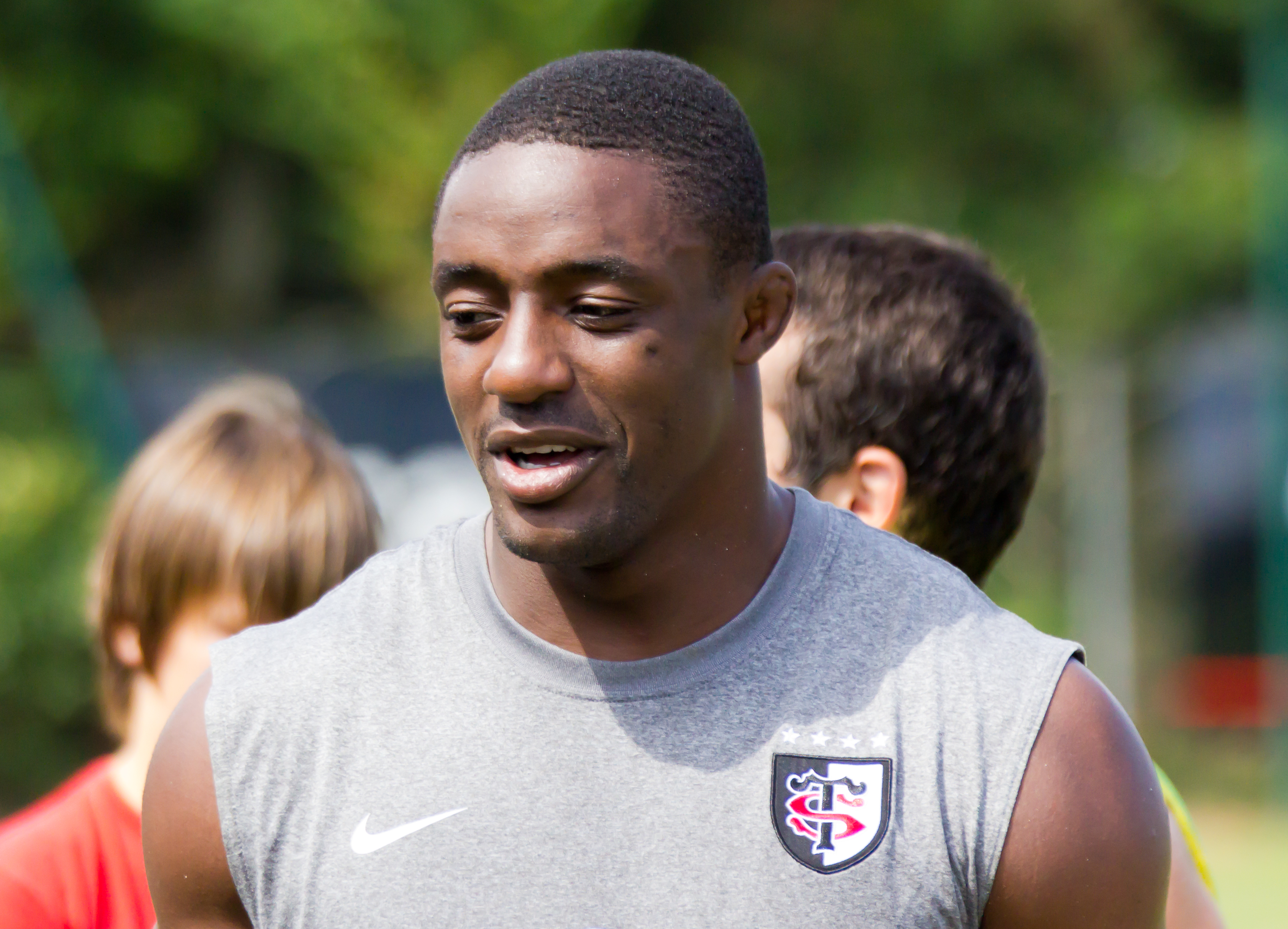 Yannick Nyanga - entrainement du Stade Toulousain